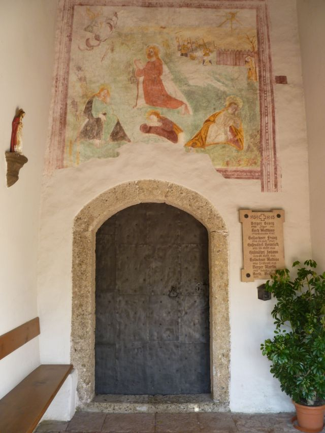 FResco auf der Südseite der Filialkirche Gois